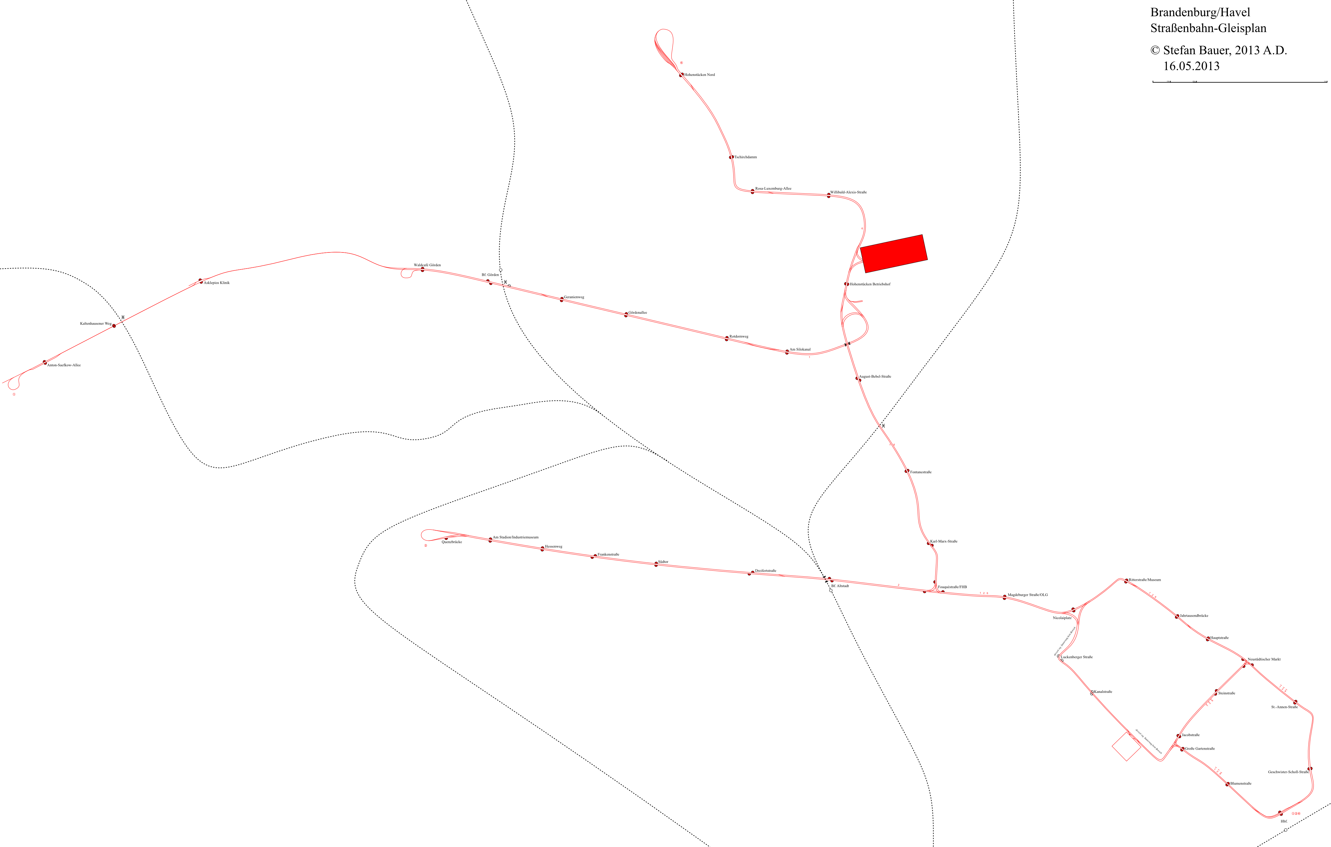 Straßenbahn-Gleisplan Brandenburg 2013